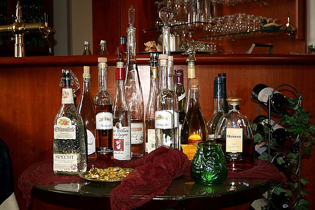 Spirituosen-Auswahl (hier als „Spirituosen-Angebot“ bei einer Hochzeitsfeier in einem Hotel-Restaurant in Uetersen, Deutschland). Camera: Canon EOS 400D Digital License on Flickr (2011-01-16): CC-BY-2.0 Flickr tags: hochzeit, uetersen, hotel, mühlenpark